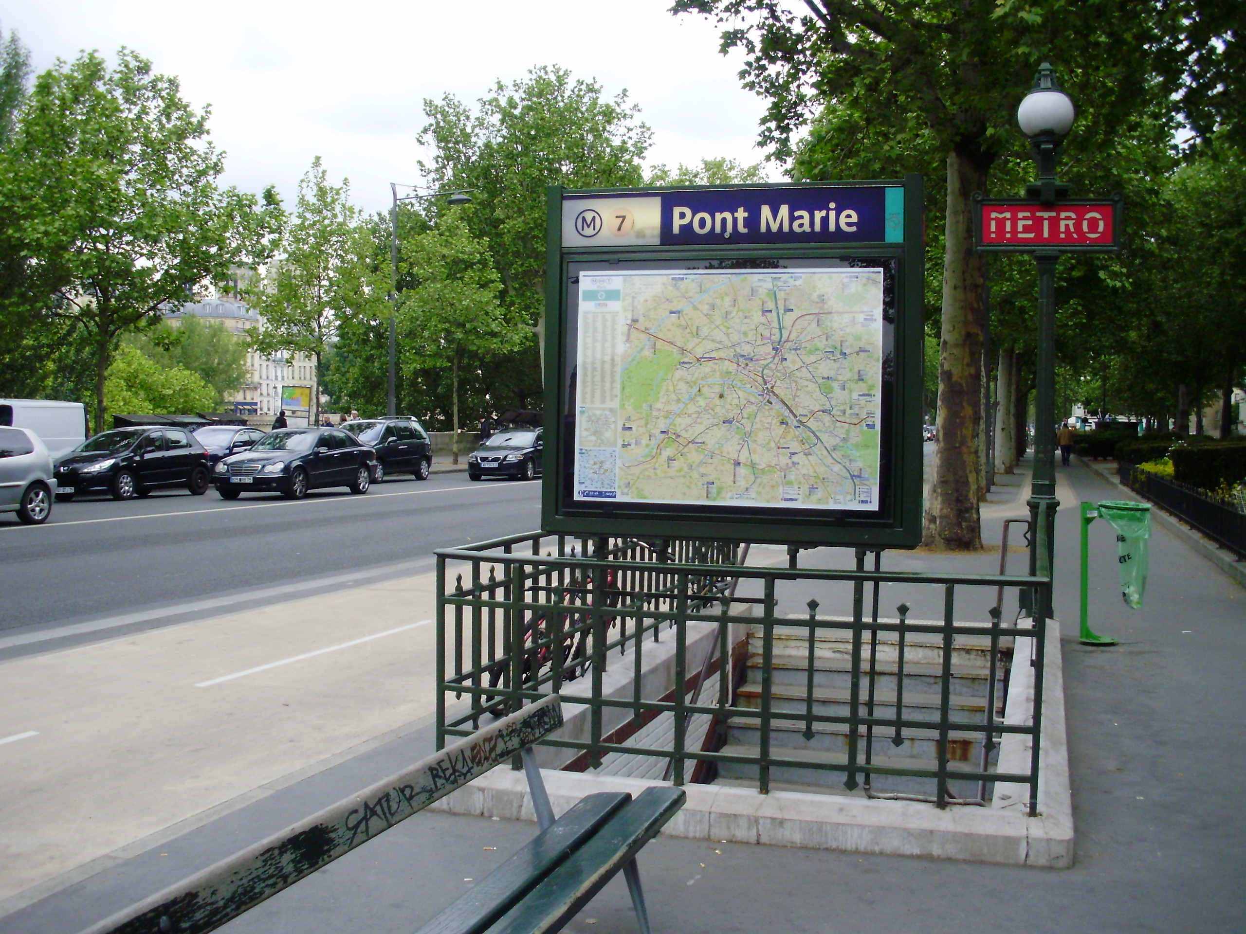 Entrée de la station « Pont Marie » du métro de Paris